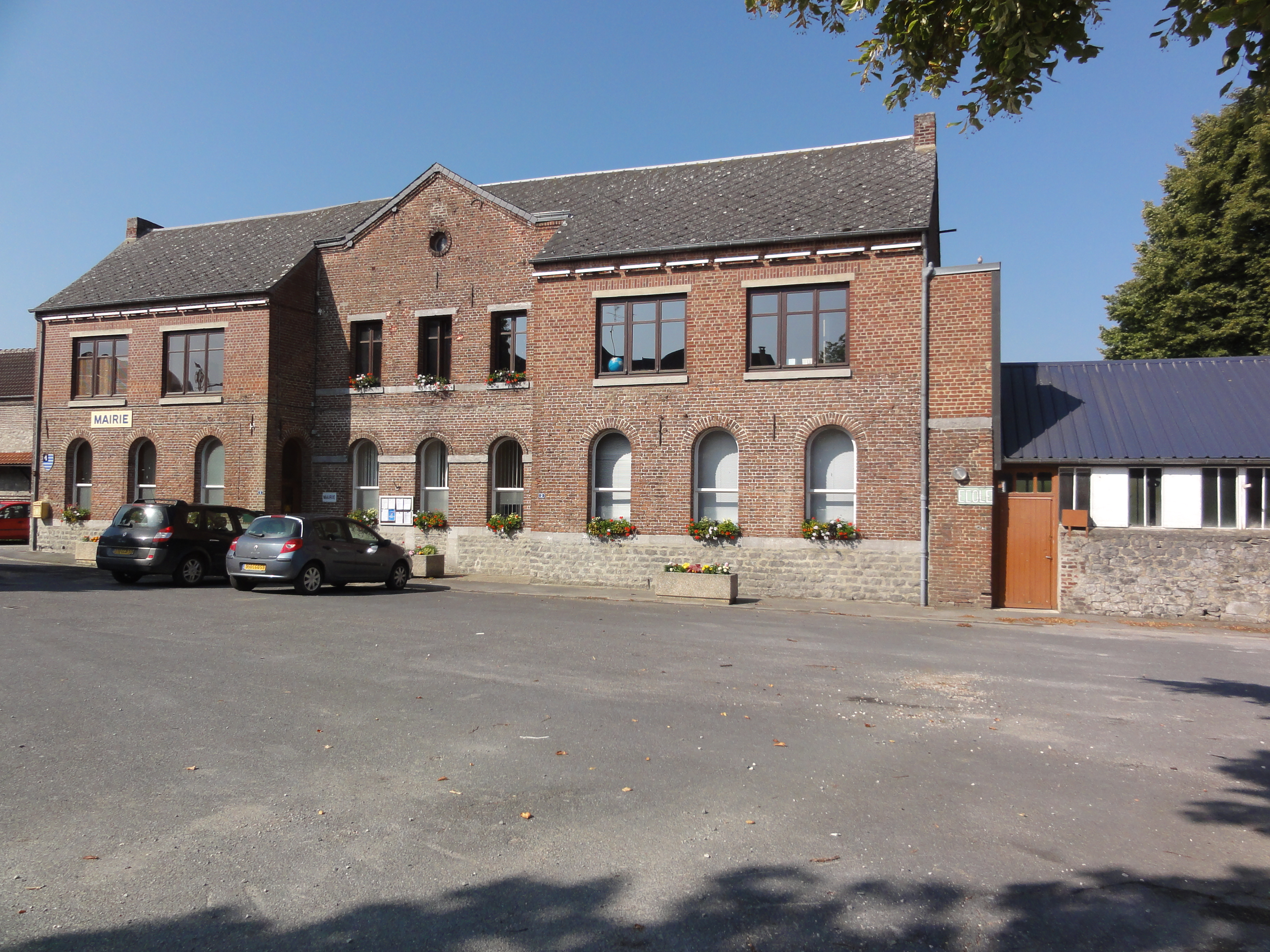 Aibes (Nord, Fr) mairie-école